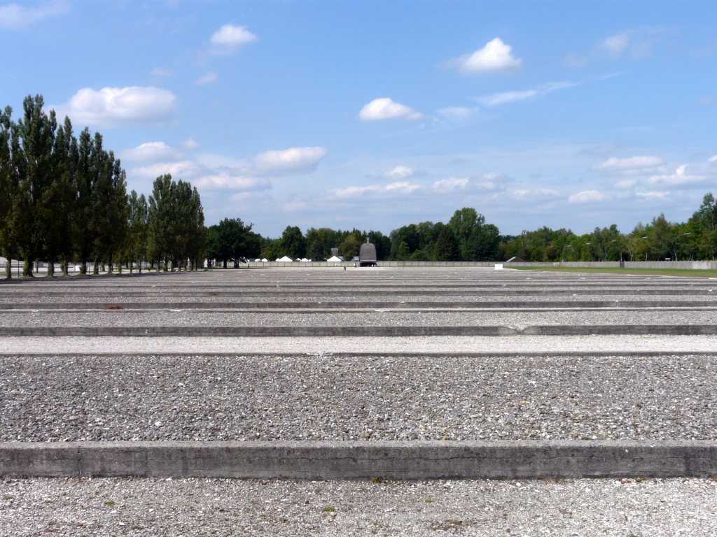 Steinfundamente zeigen den Standort der ehemals 34 Lagerbaracken im Konzentrationslager Dachau.